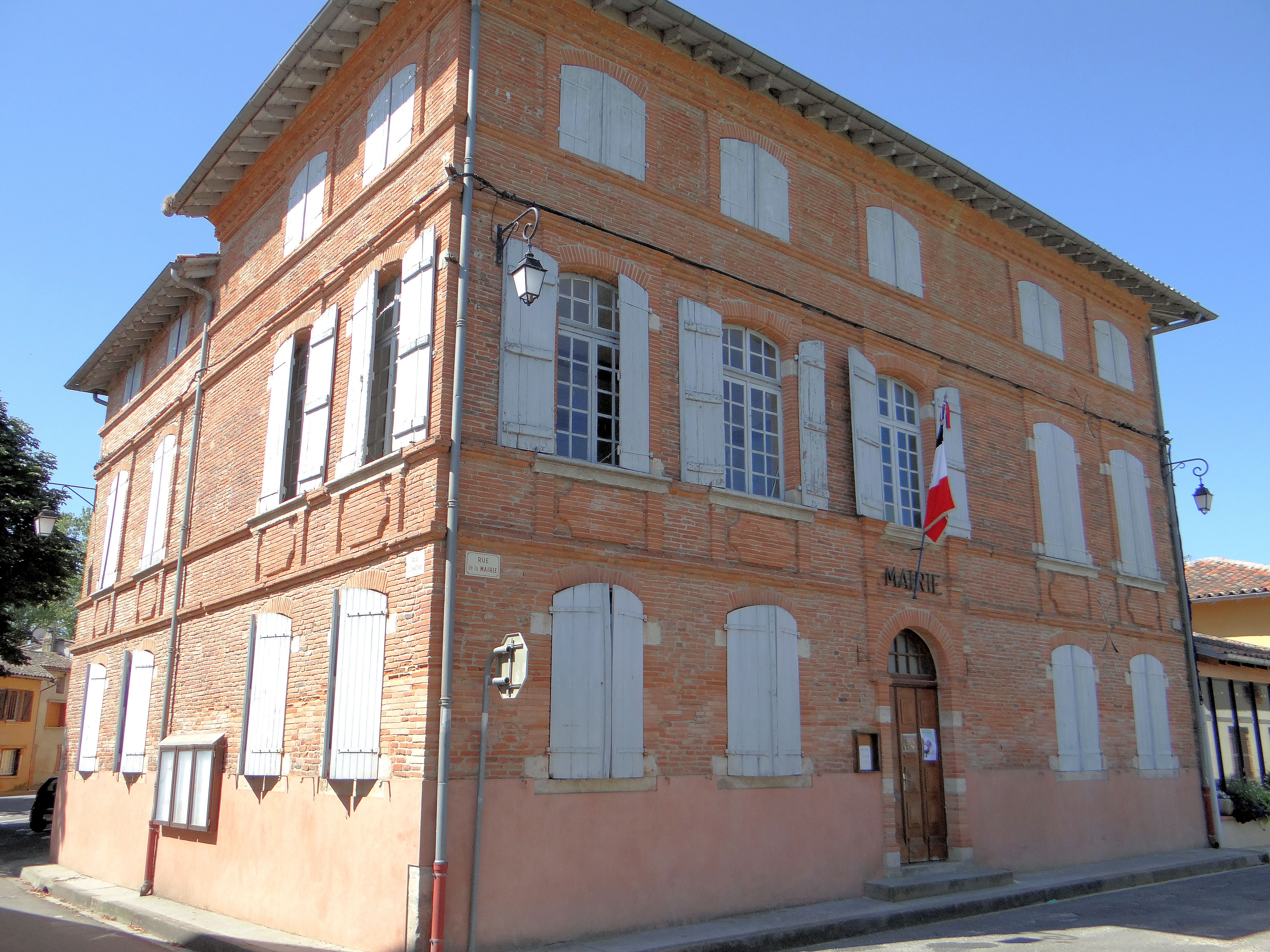 Bioule - Mairie